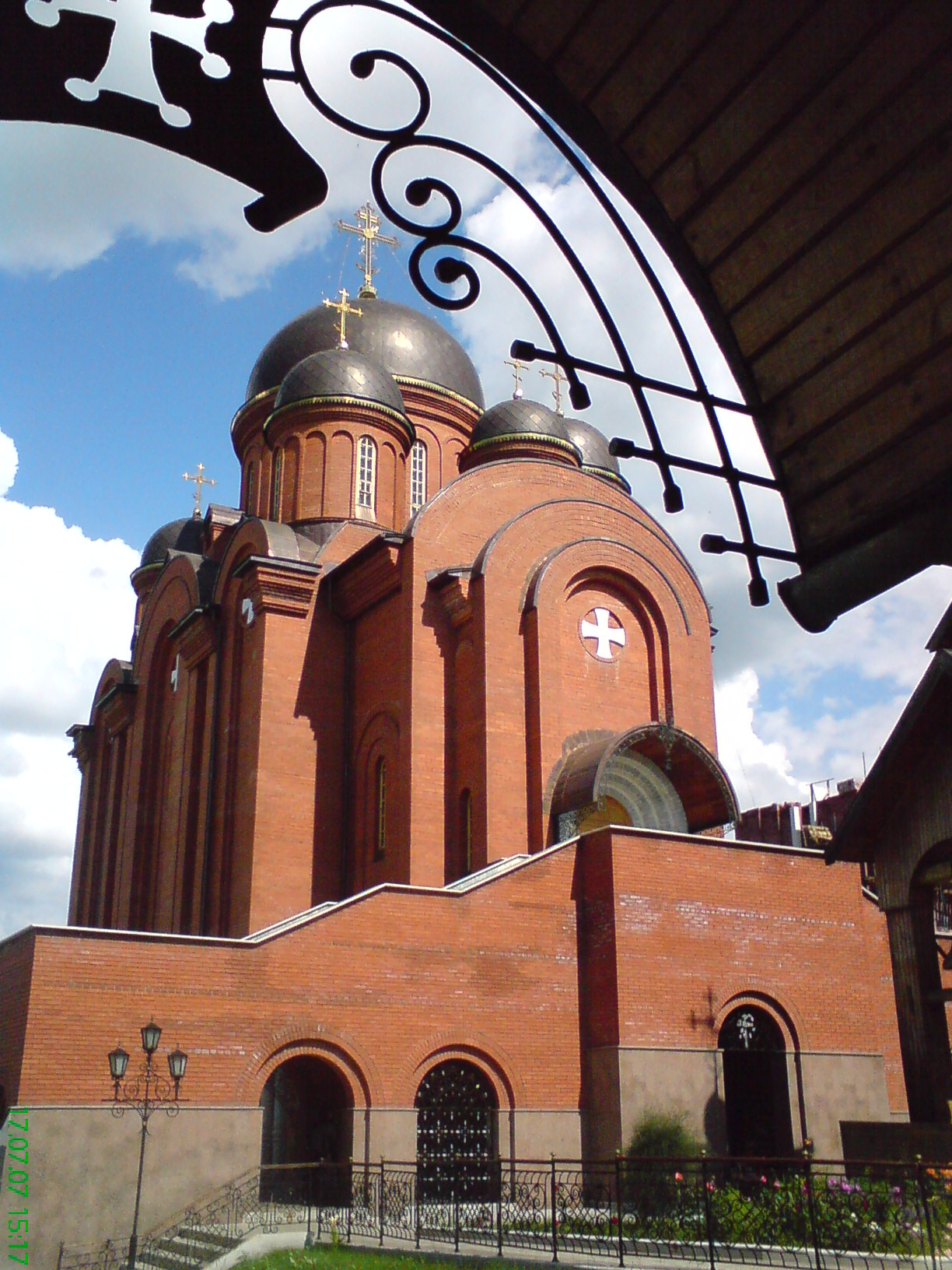 Троицкий собор Свято-Троицкого монастыря в Алатыре